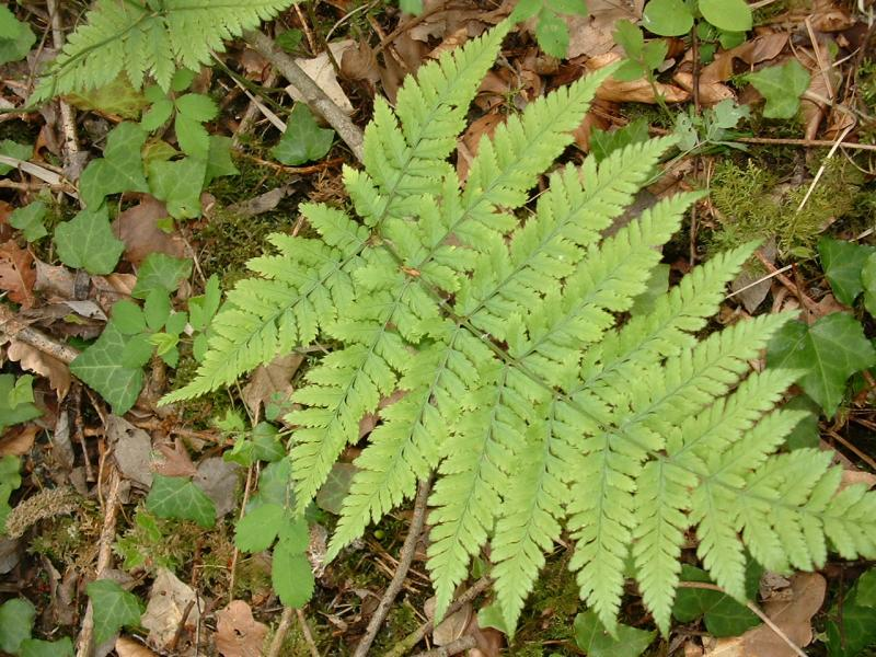 identité à confirmer, photo J.F. Gaffard, Bucey-lès-Gy, mai 2004